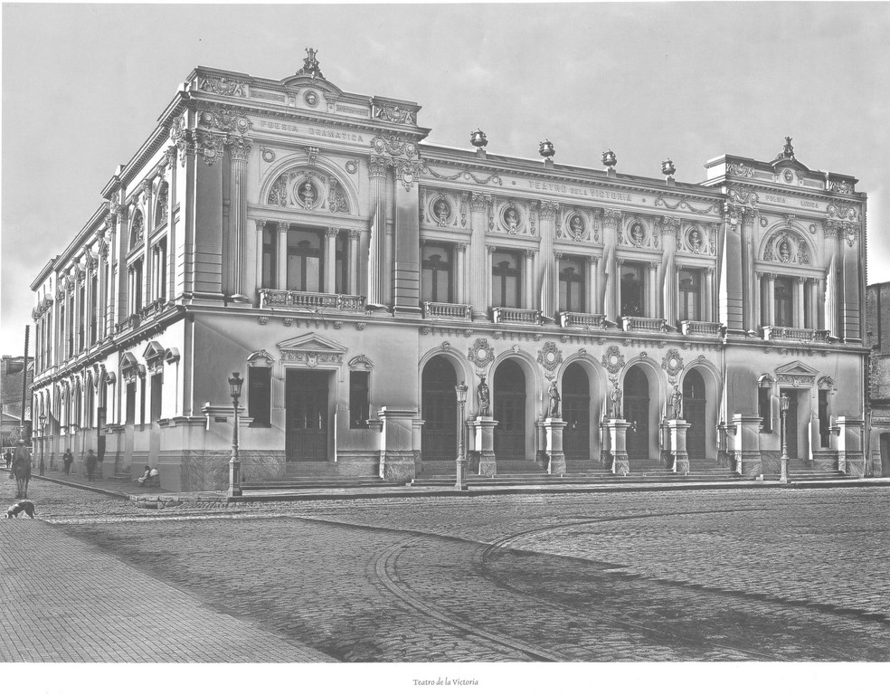 Fotografías tomadas por el estadounidense Harry Grant Olds, en Valparaíso durante su estadía en Chile, entre los años 1899 y 1900